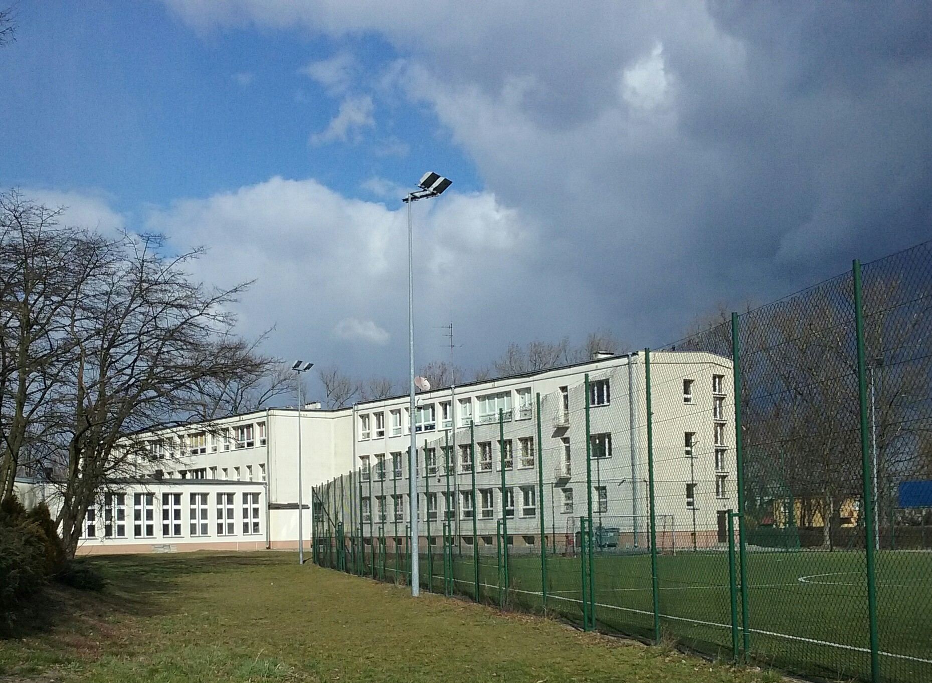 II Liceum Ogólnokształcące w Tomaszowie Mazowieckim widok od strony Zalewu Sulejowskiego